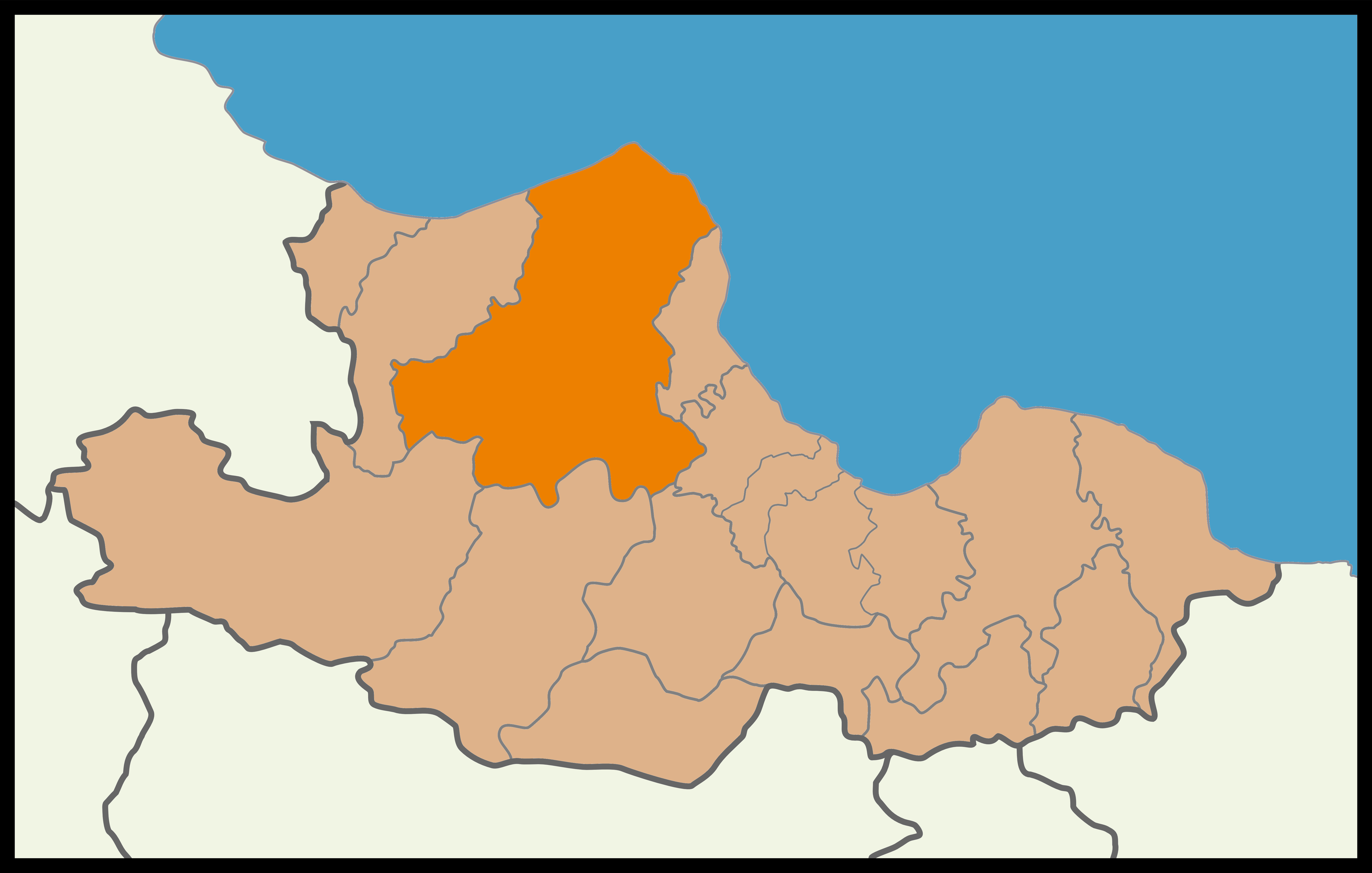 Samsun'un Bafra ilçesinin 2014 Türkiye yerel seçimleri haritası.